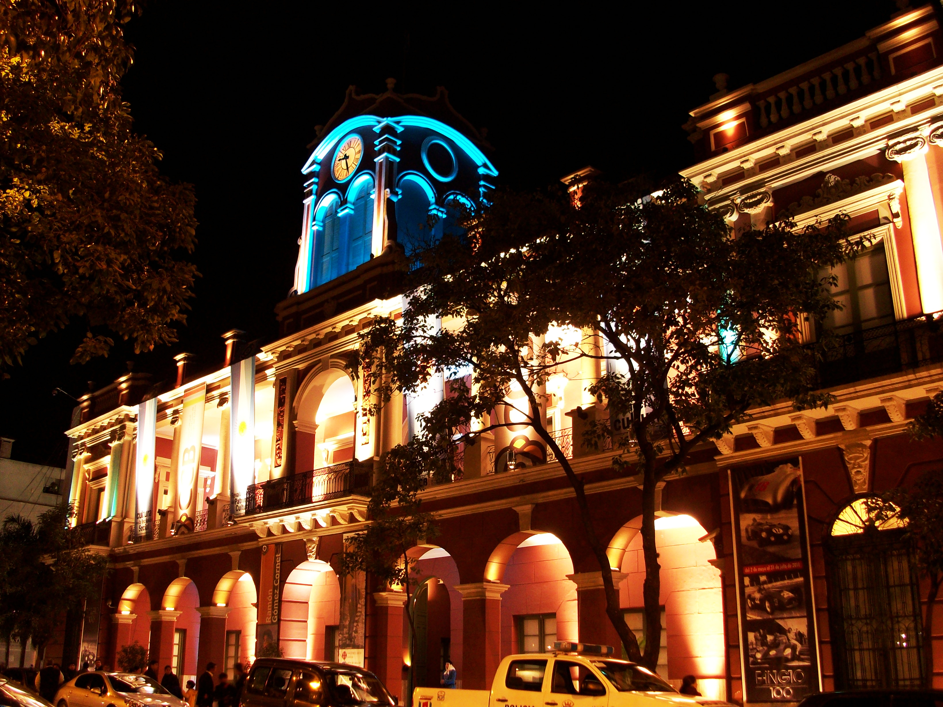 Fachada del Centro Cultural de Bicentenario de Santiago del Estero, Argentina durante la noche.